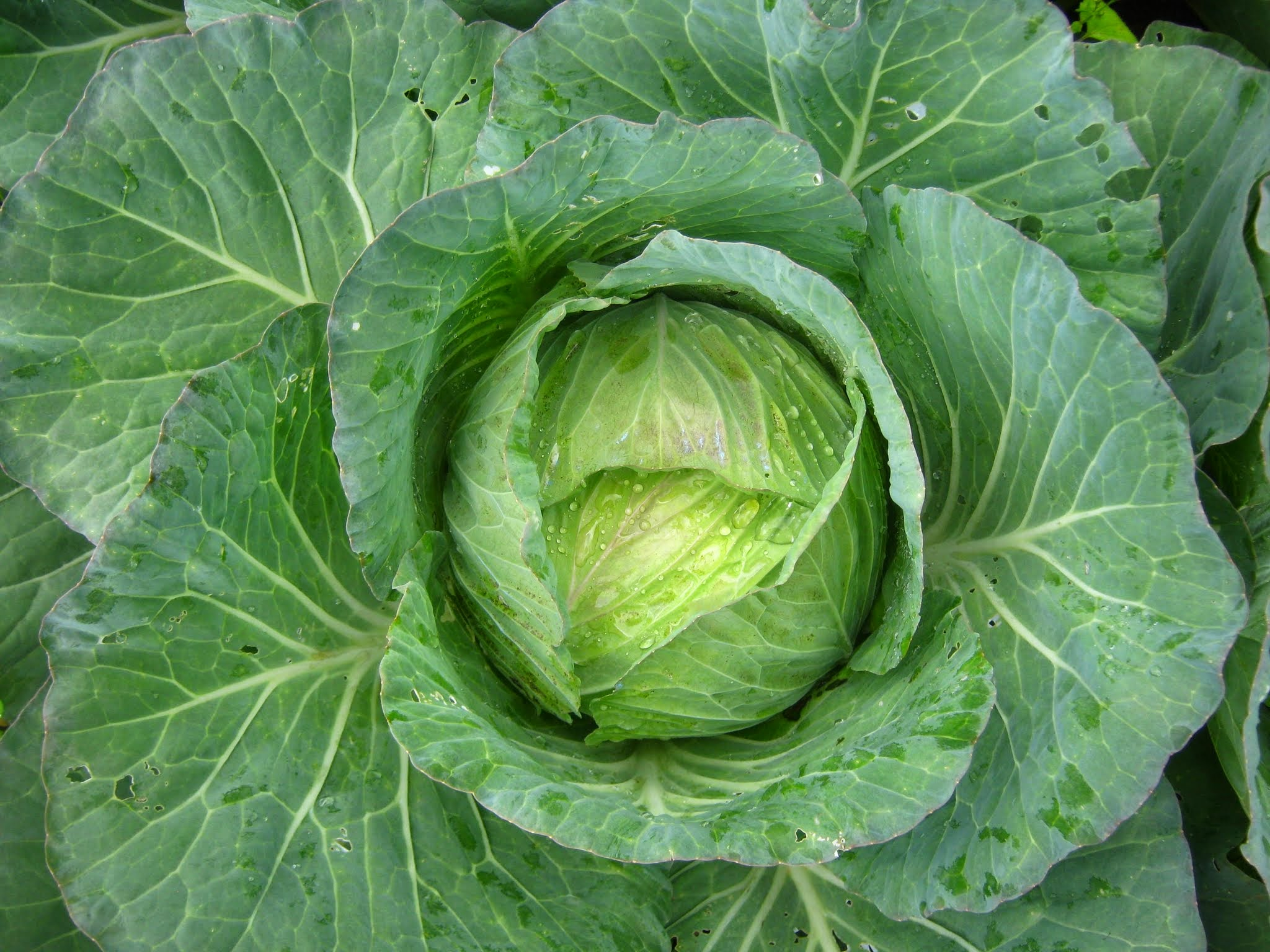 Le chou